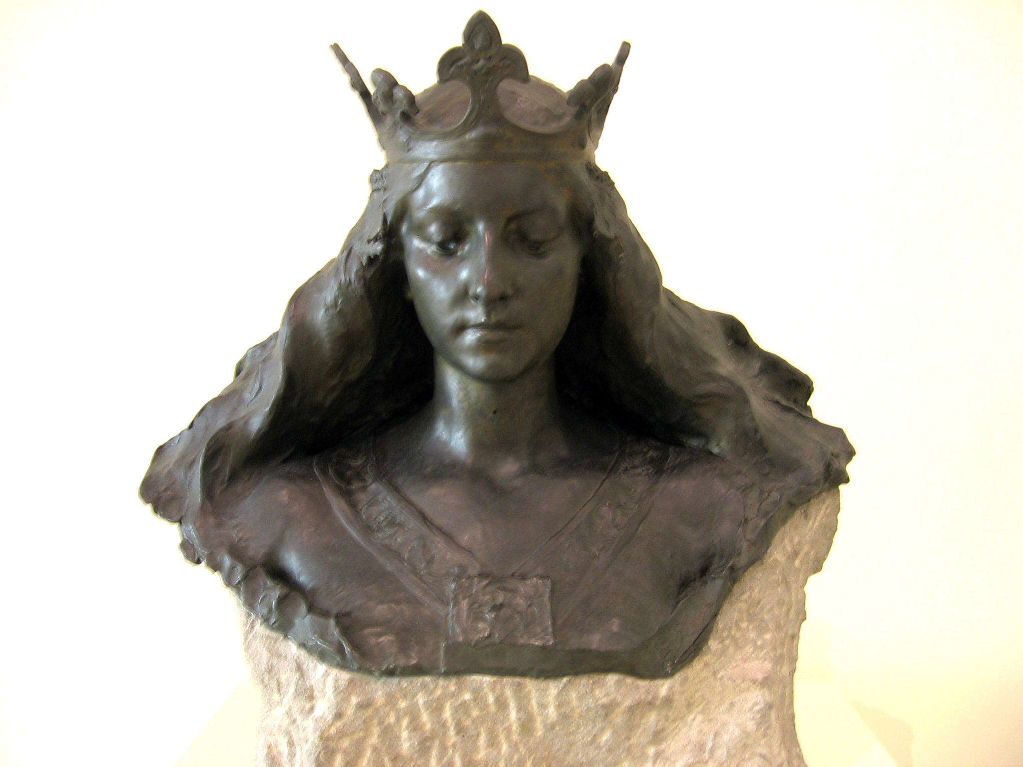 Eusebi Arnau, Busto de matrona representando Barcelona, 1897, MNAC, Barcelona.